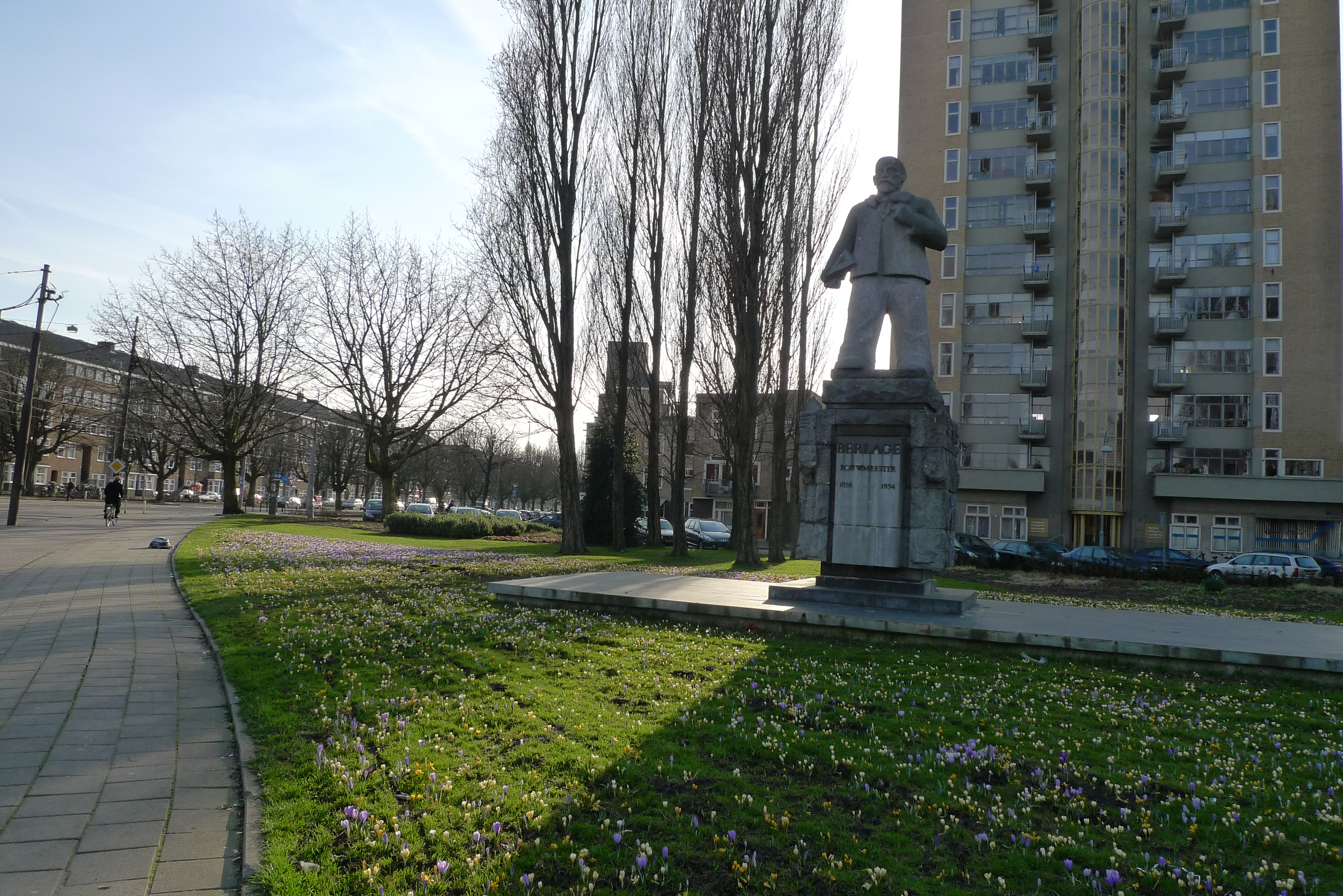 Berlage (1956/66) by Hildo Krop, Victorieplein in Amsterdam/The Netherlands